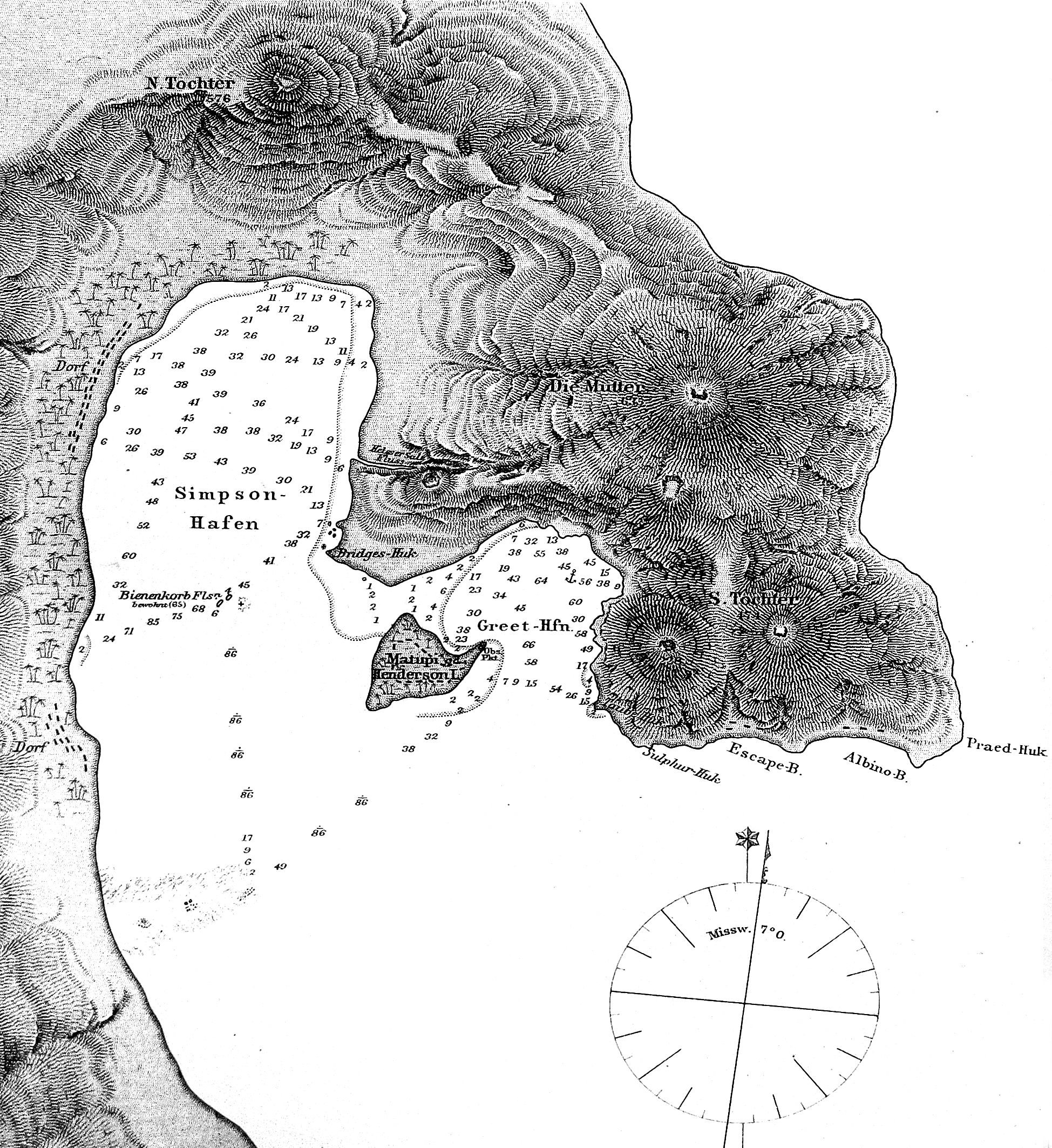 Die Blanchebai der Gazelle-Halbinsel lt. Vermessung von SMS Gazelle im August 1875 (Ausschnitt)